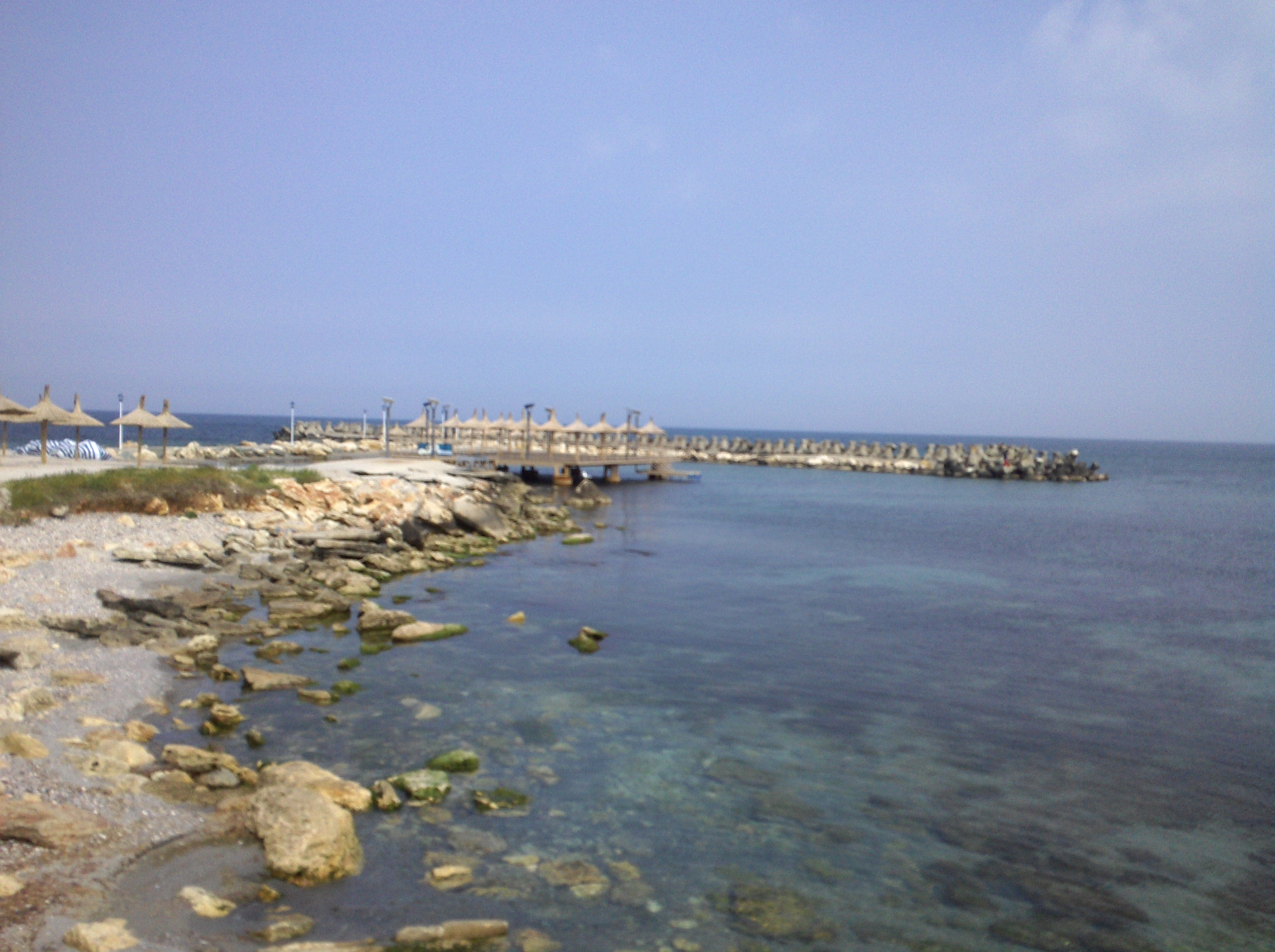 Platja de Venus en Romania